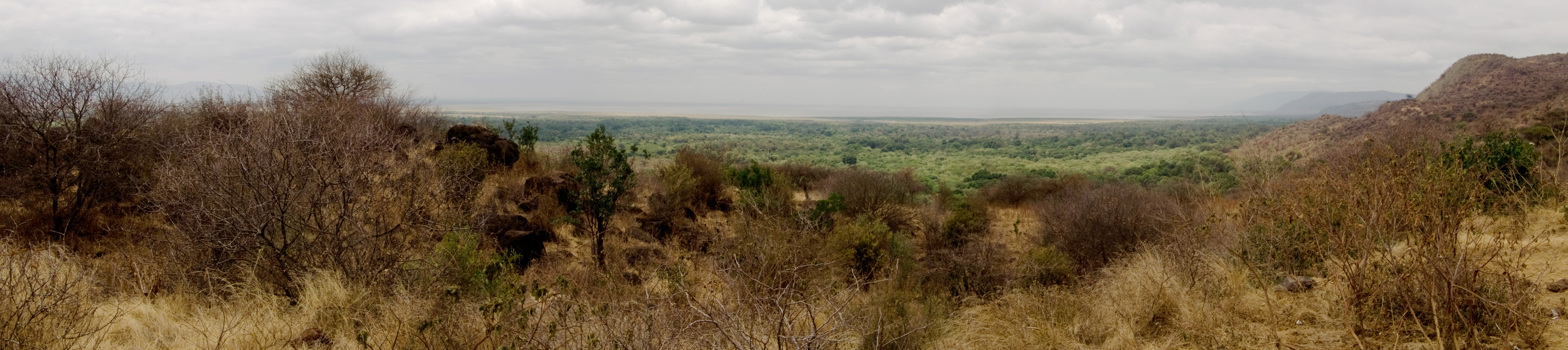 Panoramic view over Lake Manyara, Tanzania.